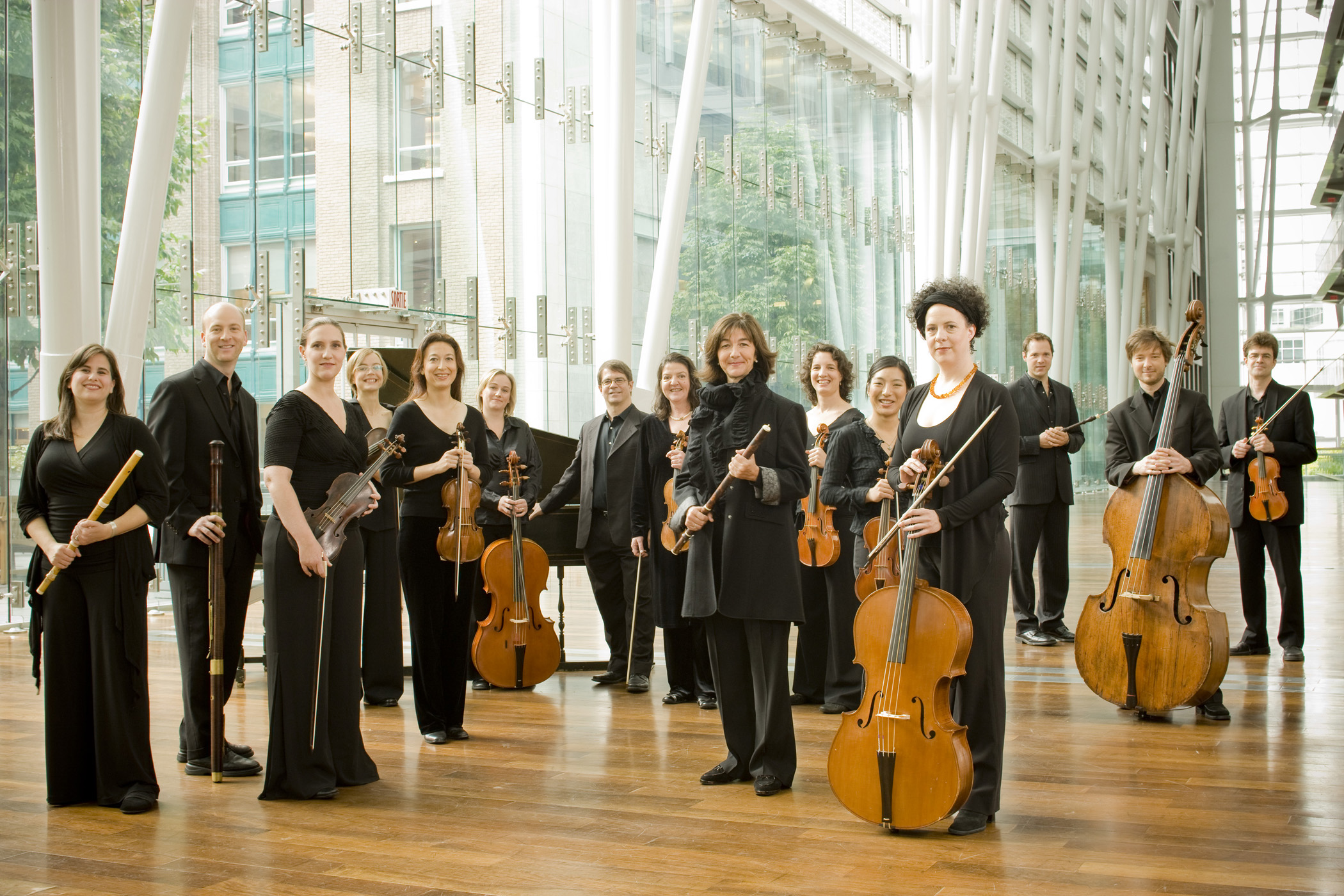 Photo de l'ensemble Arion, un orchestre baroque créé en 1981 et qui a la caractéristique de jouer sur instruments d'époque.